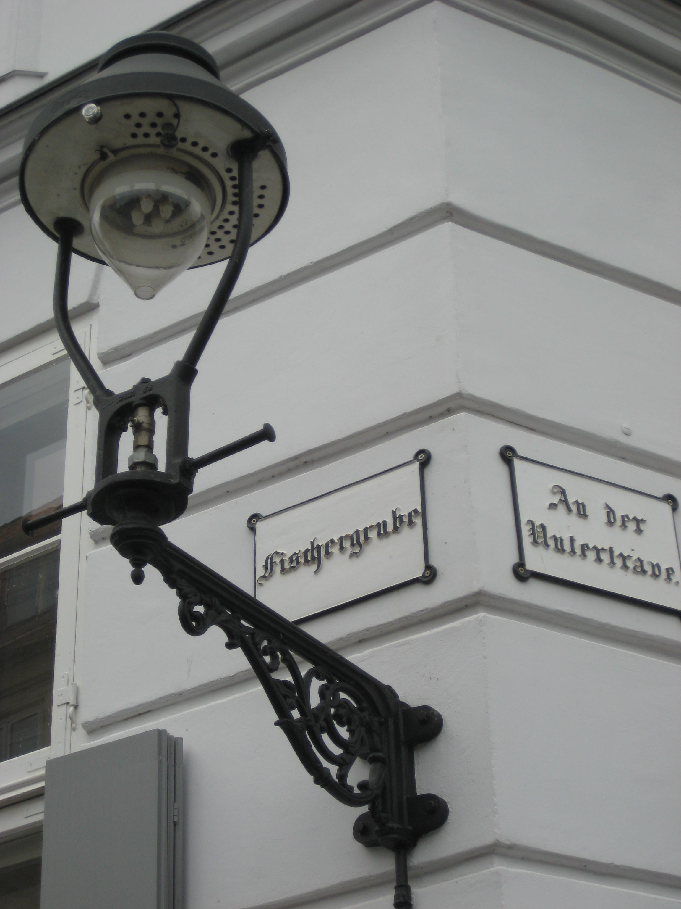 Straßenbeleuchtung durch Gaslampe in Lübeck an der Trave, Ecke Fischergrube/An der Untertrave